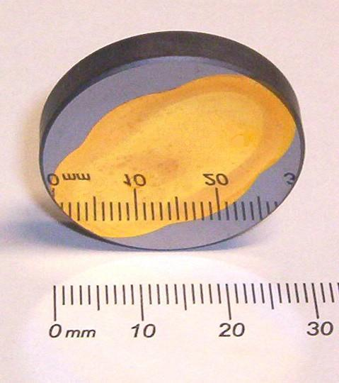 gold coated silicon disc (laser mirror, carbon dioxide laser)